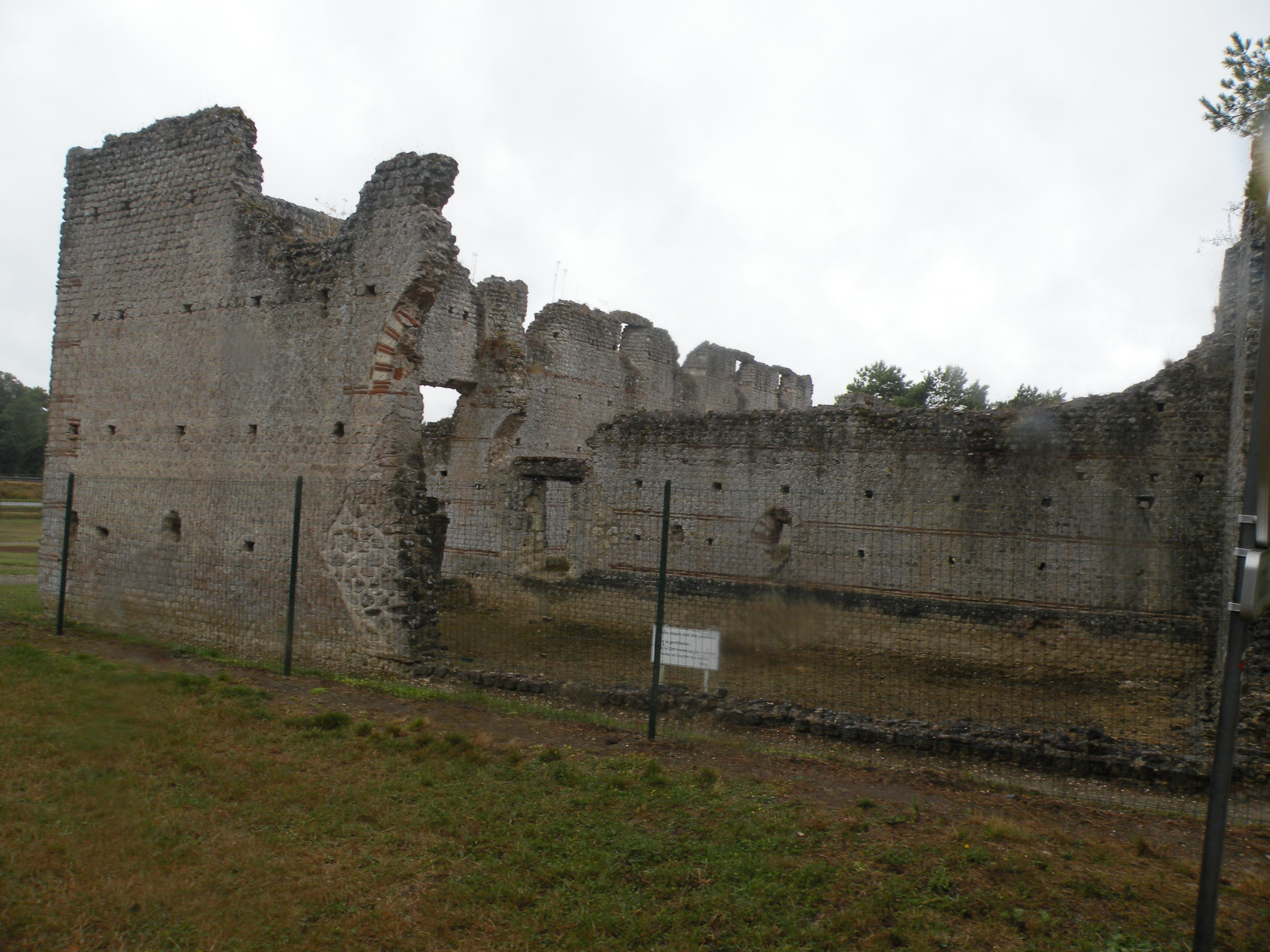 Ruines romaines des Mazelles .